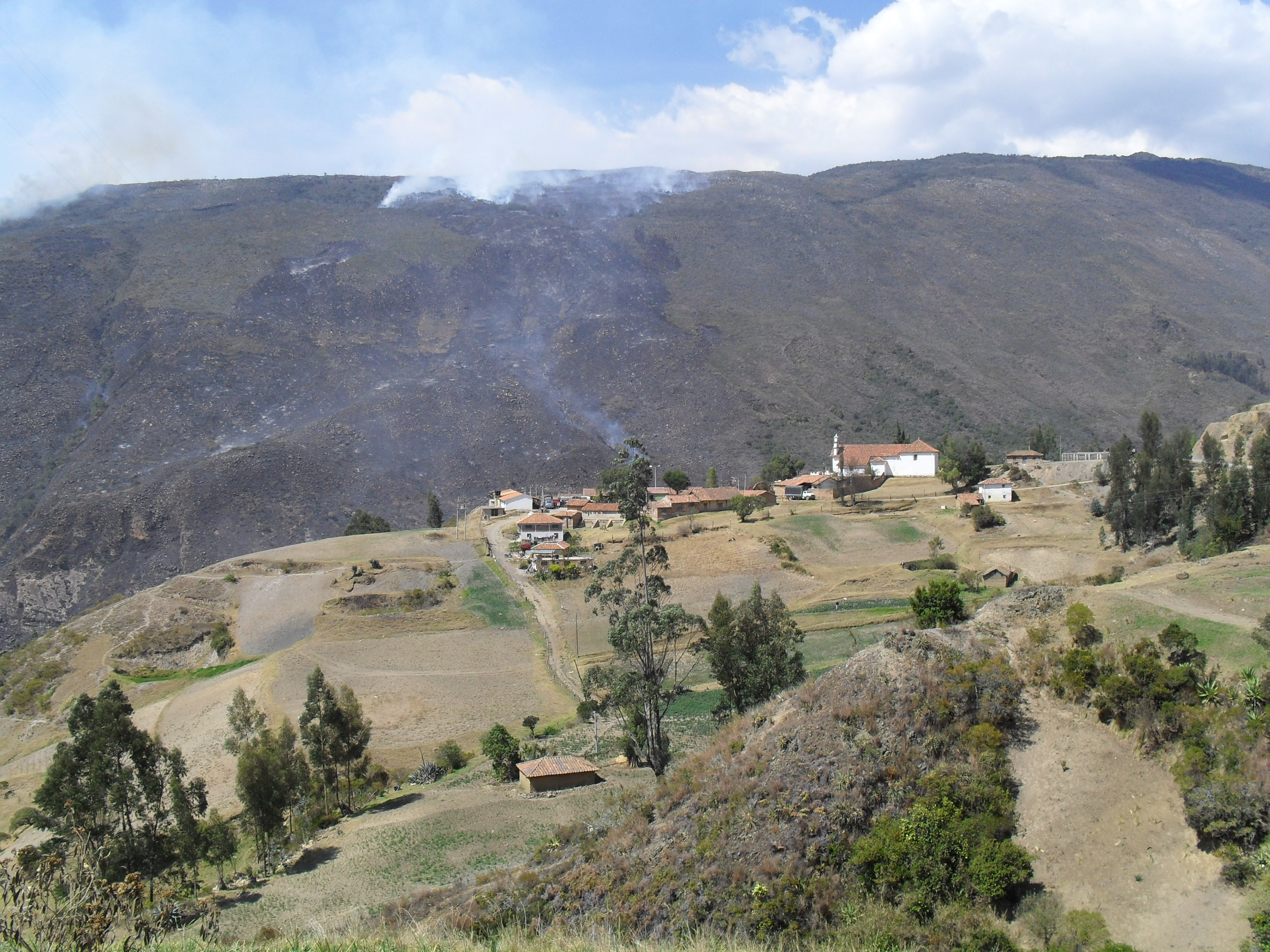 Incendio forestal en el municipio de ChíquizaBoyaca Colombia